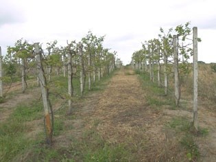 Viñedos de Bodegas Echeverría en Ecuador